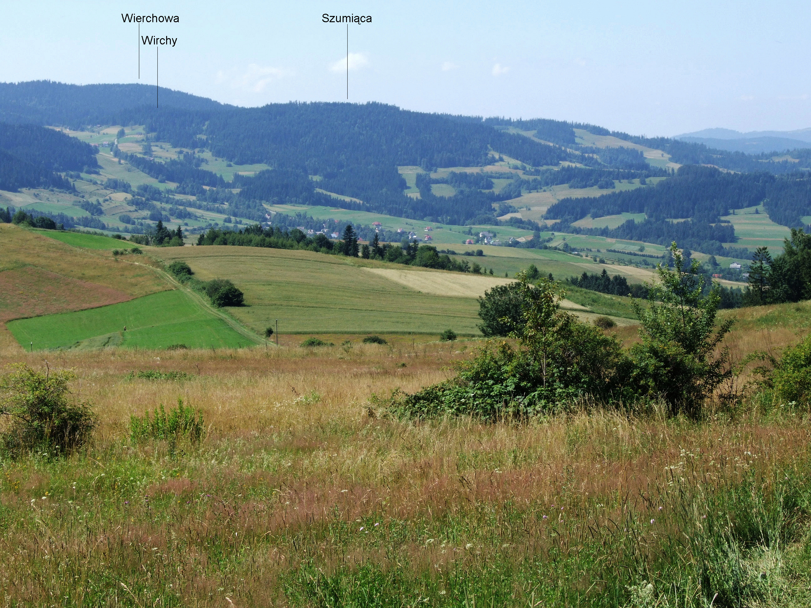 Widok z Potaczkowej